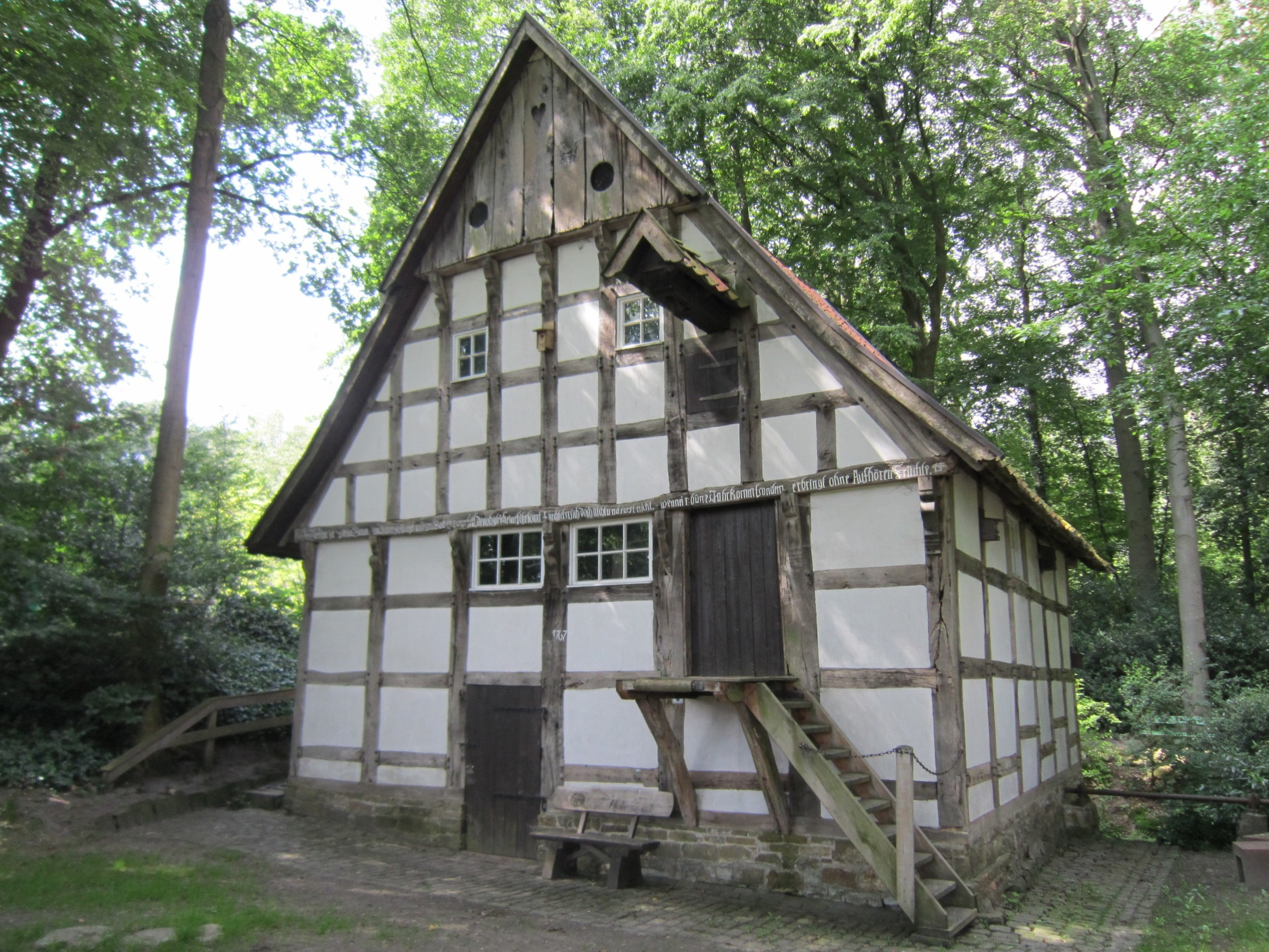 Vorderseite der Wassermühle Riesau in Balkum (Stadt Bramsche, Landkreis Osnabrück, Niedersachsen)